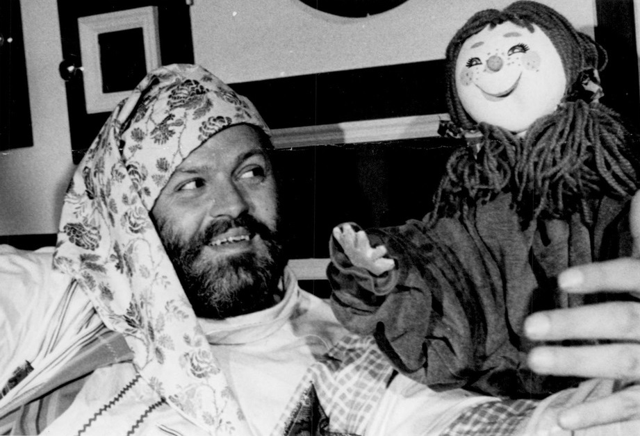 Beppe Wolgers i samband med tv-programmet Beppes godnattstund. Införd i Svenska Dagbladet 1968-12-24 sid 23.